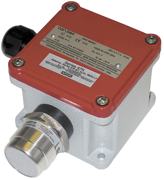 Passiver Gasdetektor 47K